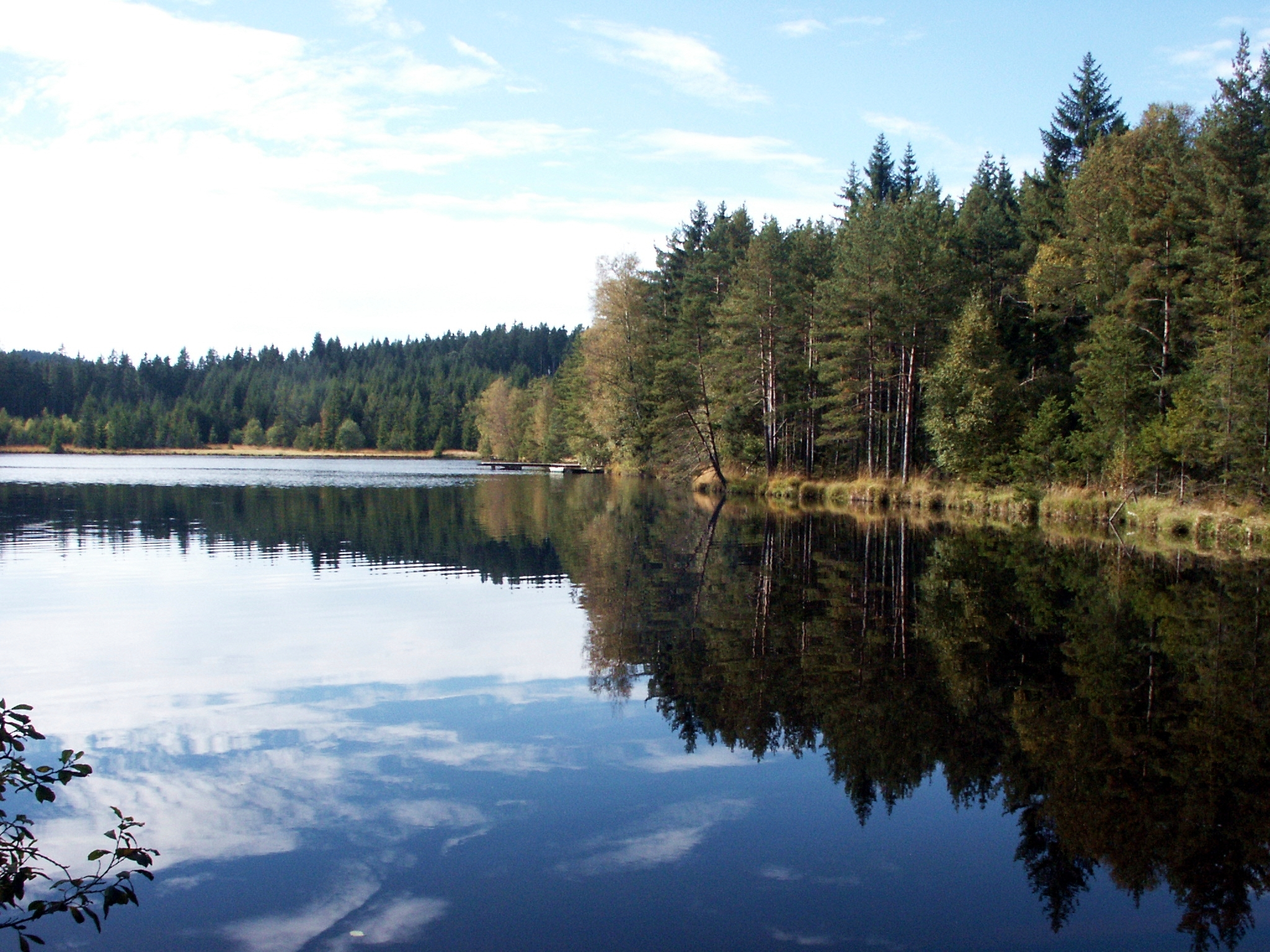 Edlesberger Teich